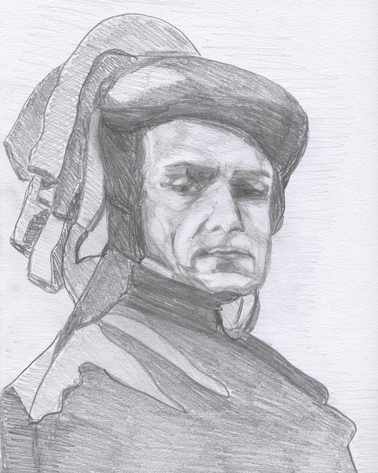 Eric Porter dans le rôle du Duc de Buckingham dans Richard II par Marie-Christine SAGLIER-GALLICHER 2006 OEUVRE PERSONNELLE